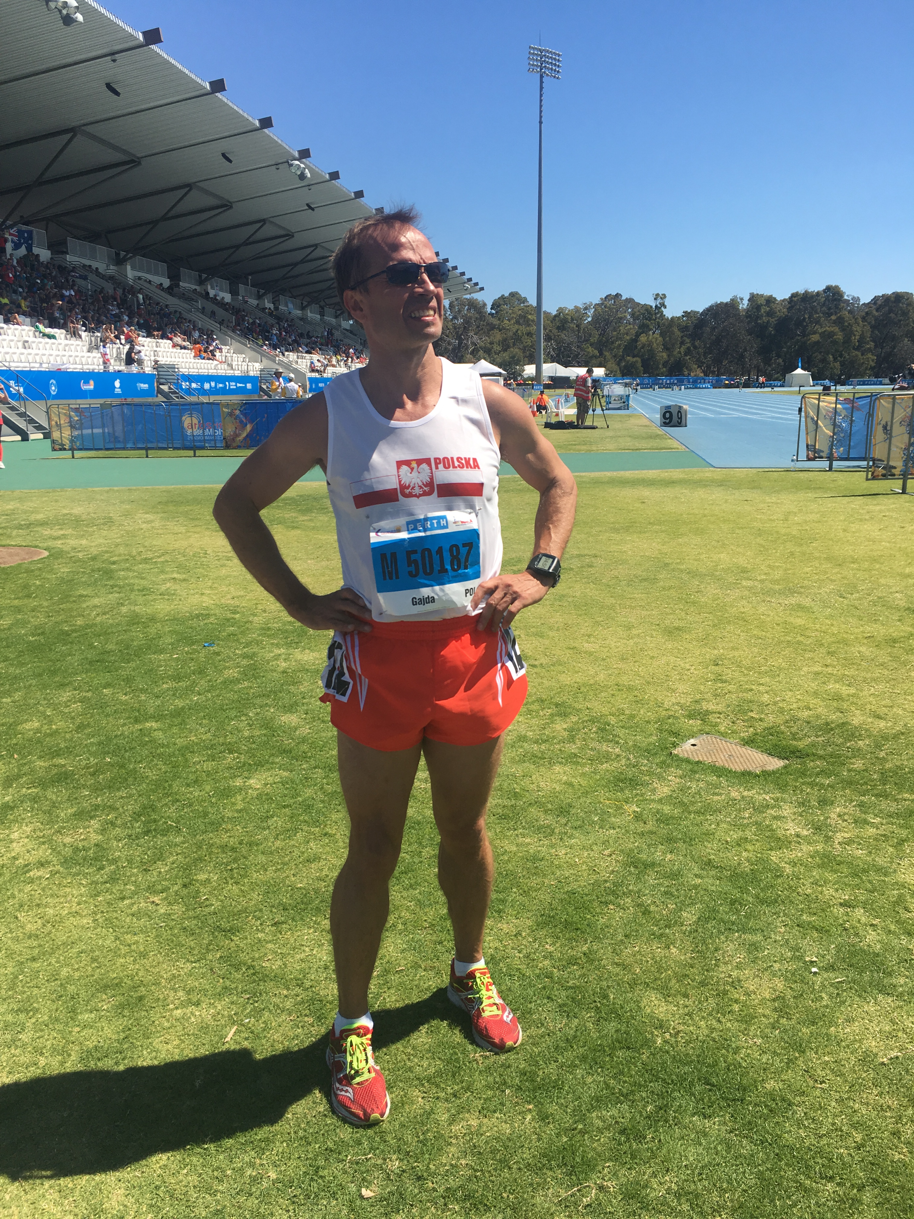 dr n. med. Robert Gajda